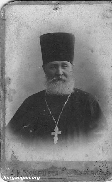 На обратной стороне: 1910 г. Последний священник Семискульской церкви Михаил Батарлинов. Приговорен тройкой НКВД 5 ноября 1920 года к высылке в Чулымский край. Реабилитирован 17 августа 1992 года Курганской облпрокуратурой. Фото из семейного архива Виктора Бутенко – праправнука отца Михаила (село Мокроусово).